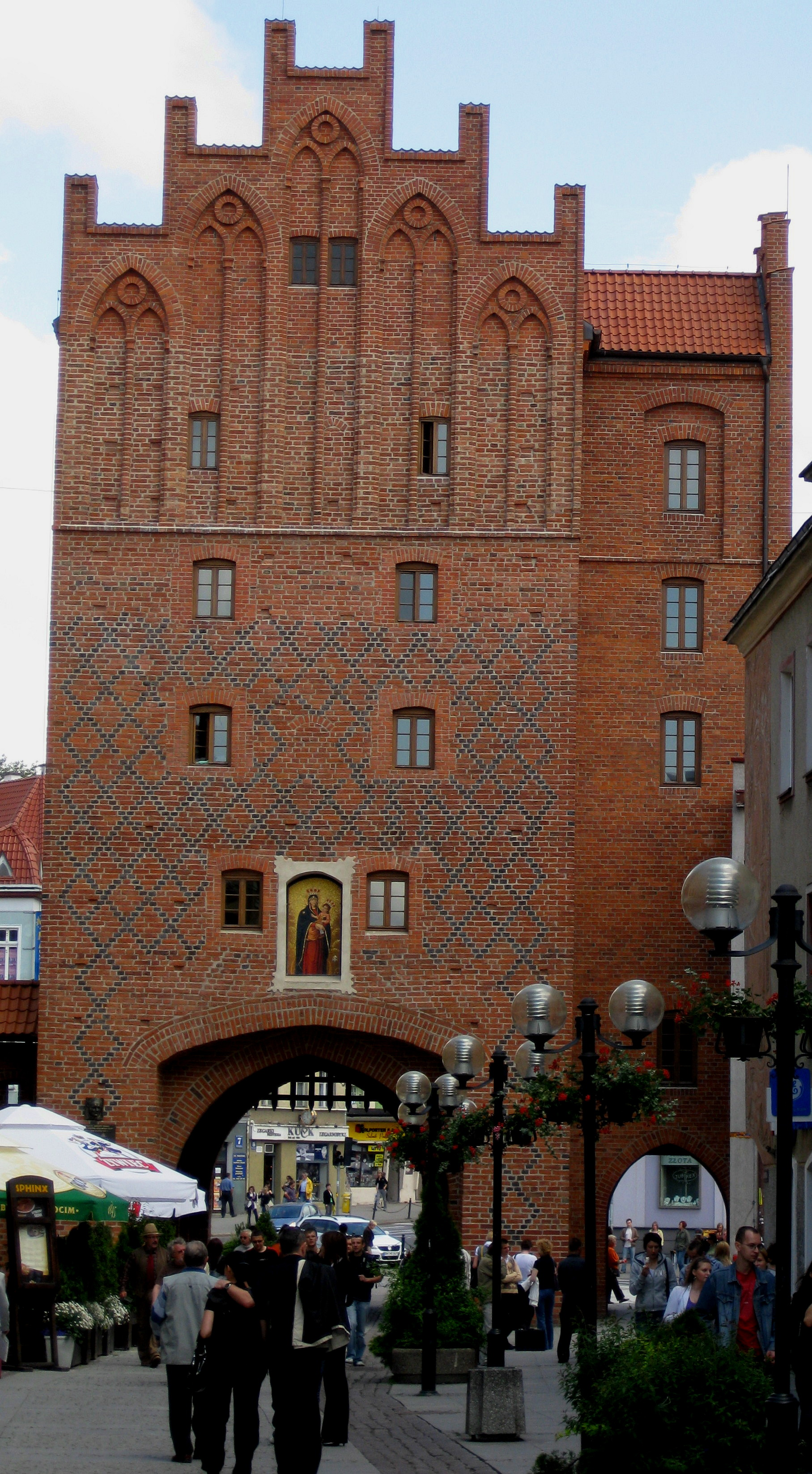 Das Hohe Tor in Olsztyn, Stadtseite